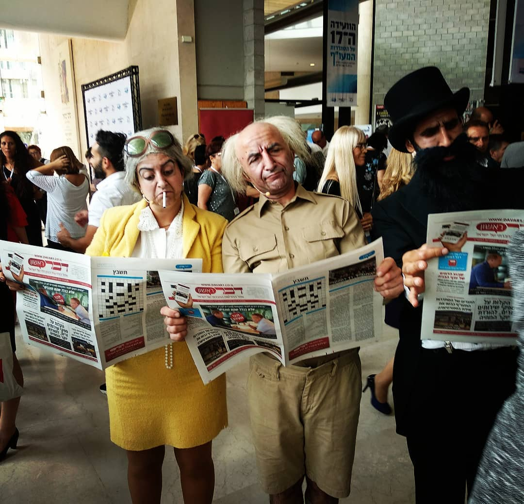 גיליון מודפס מיוחד של דבר ראשון, המופיע על פי רוב במהדורה אינטרנטית בלבד, לכבוד ועידת הסתדרות המעו"ף ה-17